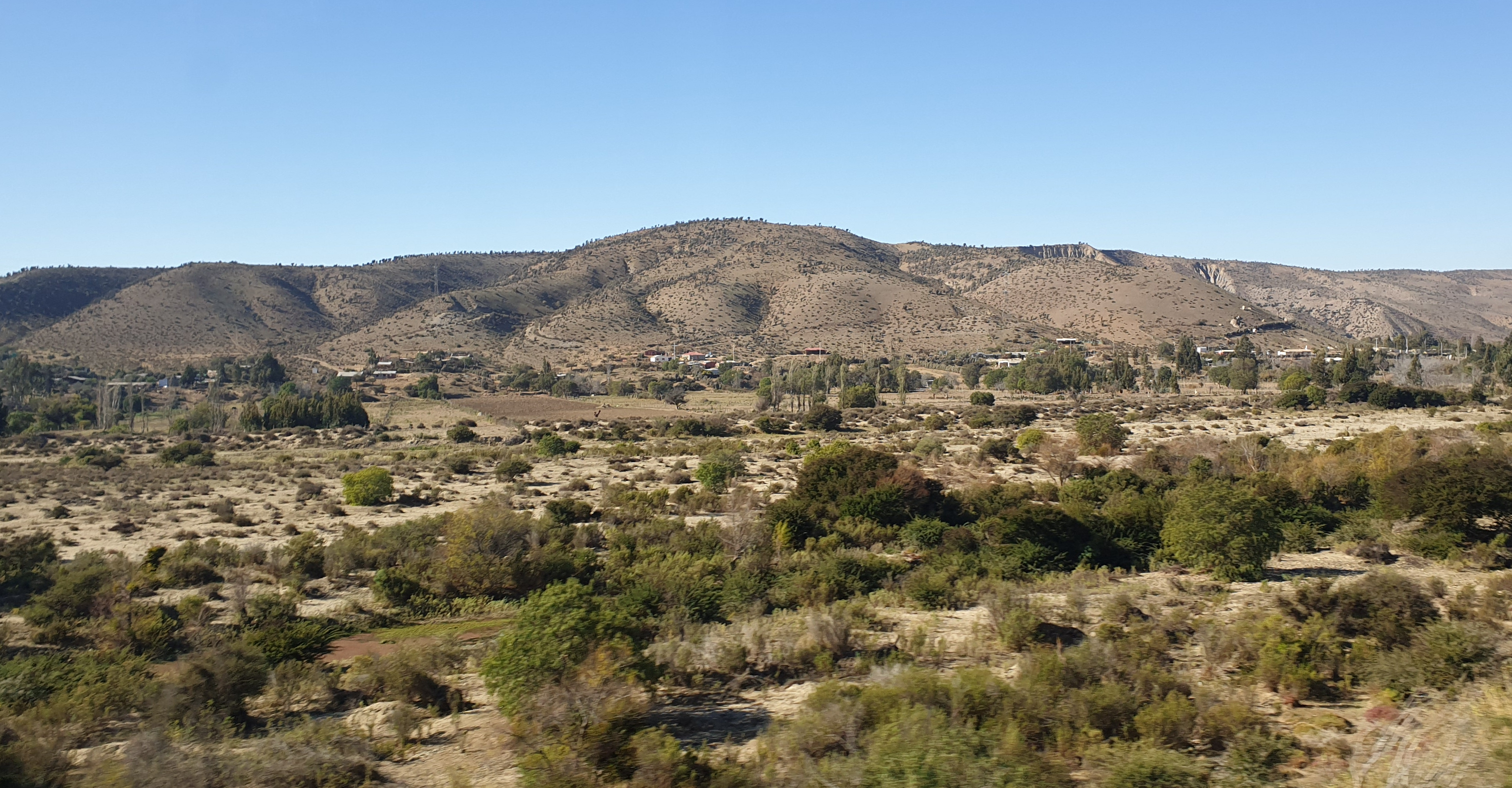 Coquimbo, Chile